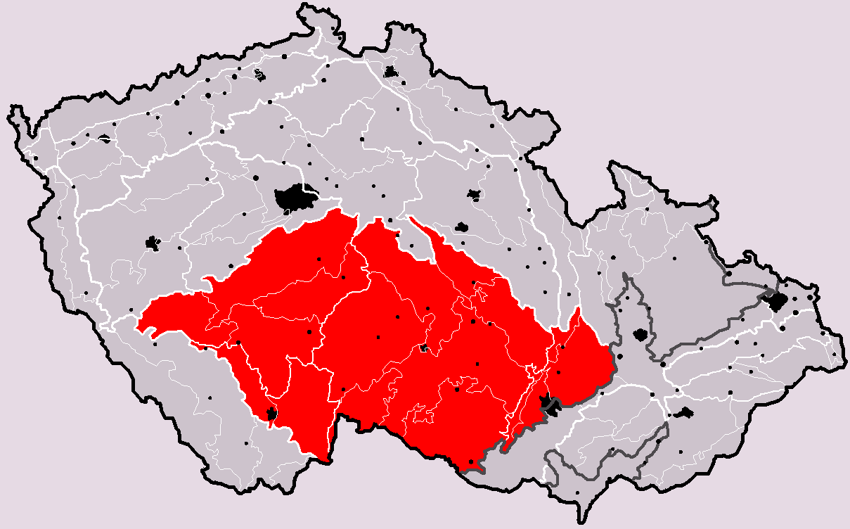 Poloha geomorfologické subprovincie (soustavy) Česko-moravská subprovincie v rámci České republiky. Hercynský systém Hercynská pohoří I Česká vysočina I2 (II) Česko-moravská subprovincie